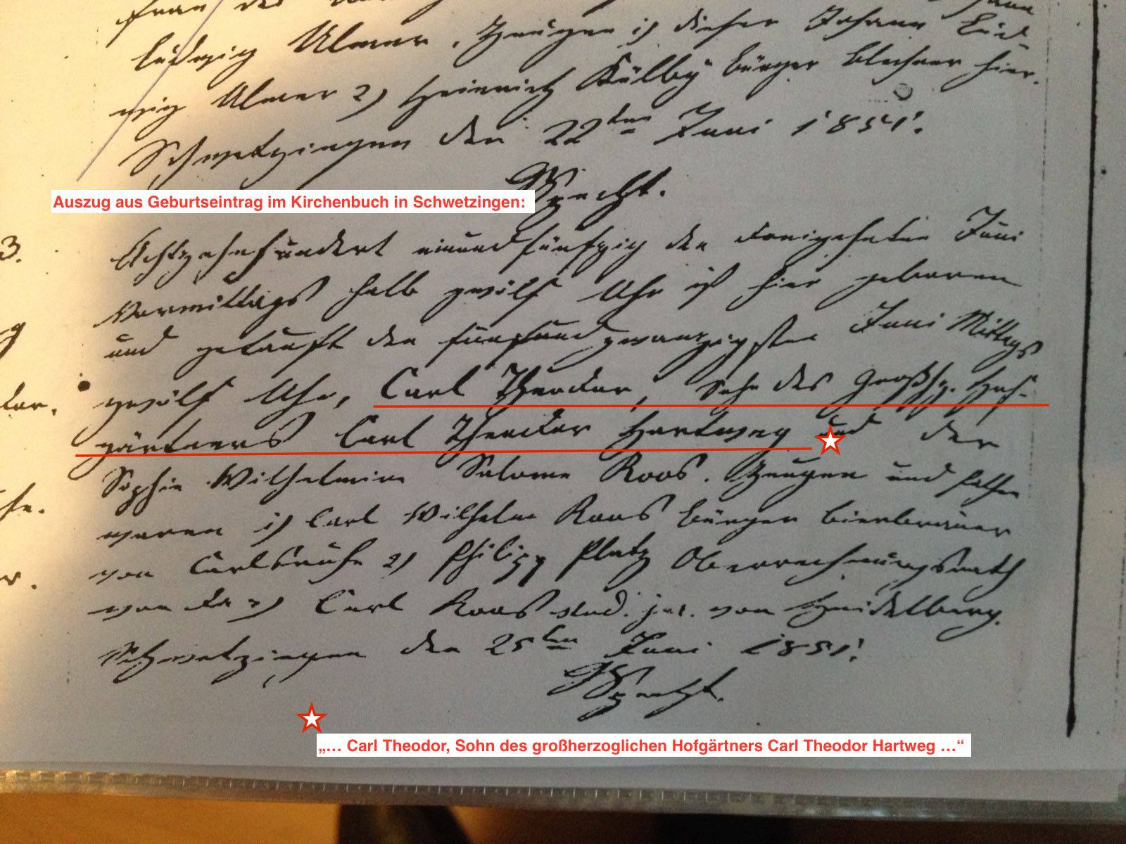 Auszug aus Kirchenregister zeigt die Schreibweise Carl